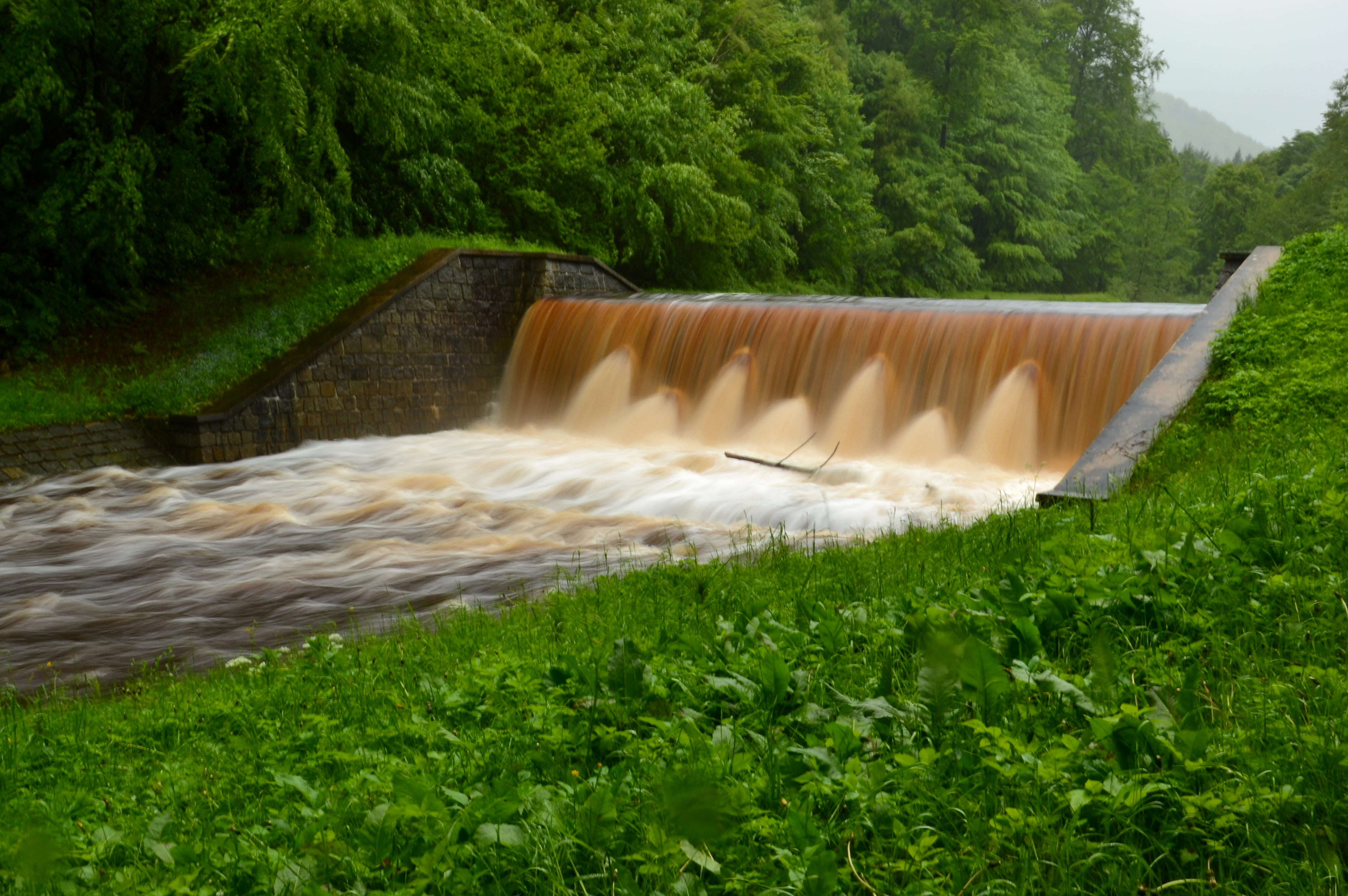 Chomutovka během povodní v červnu 2013